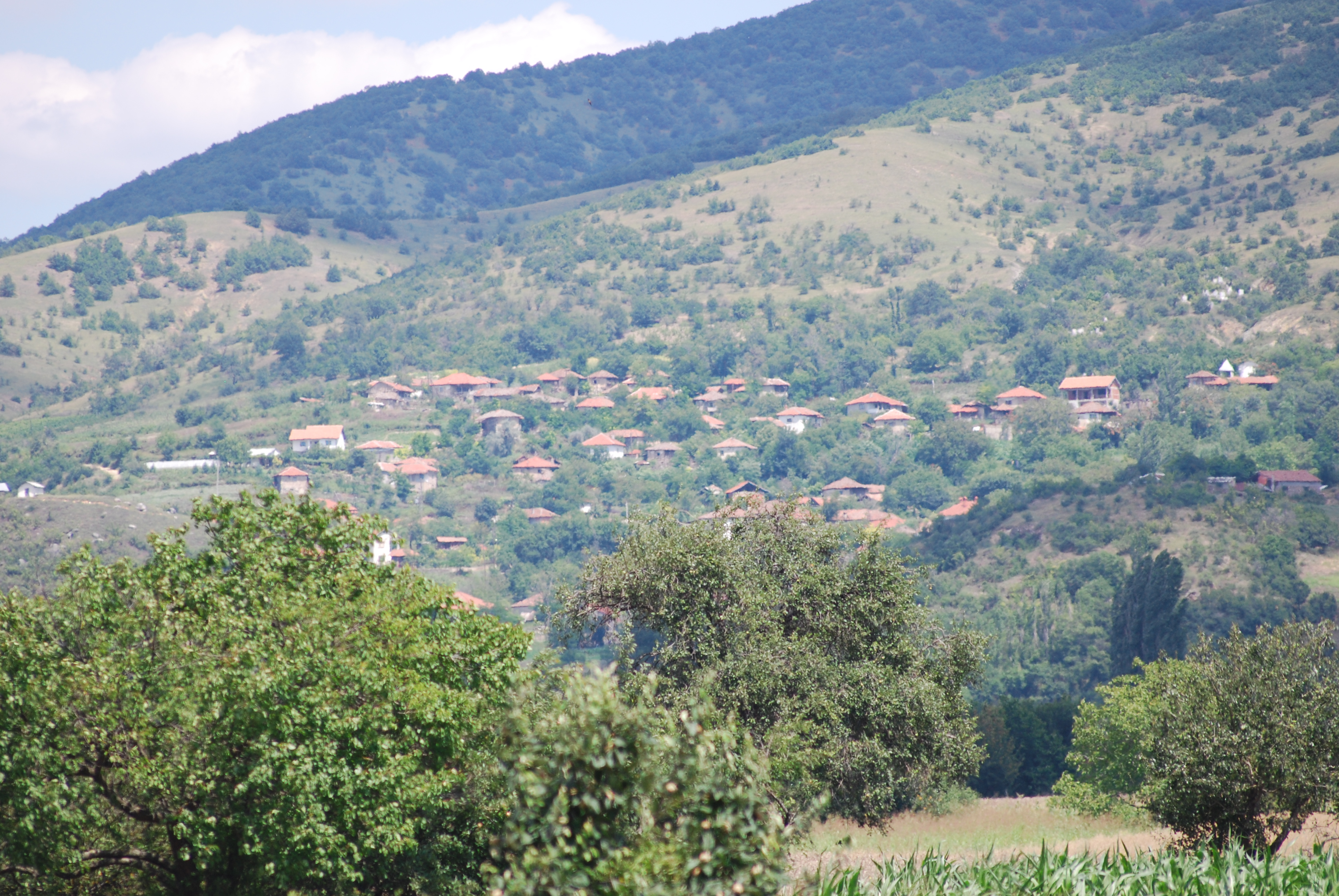 Поглед на селото Винце, кумановско, Македонија